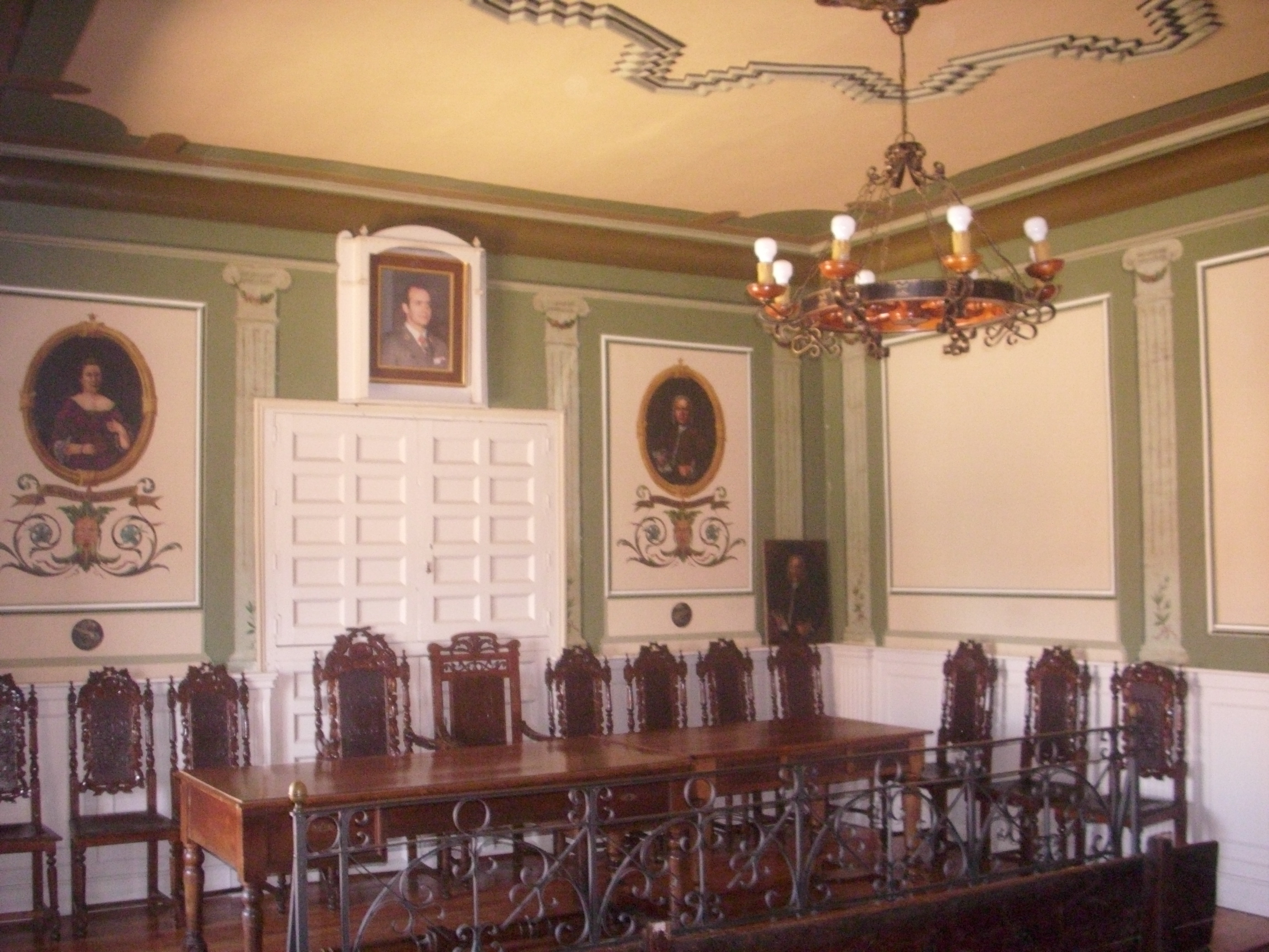 Este edificio fue casa de don Tomas Pinto Miguel y de su esposa doña Juana Monroy; en el instituyo la Obra Pia de la Escuela y después lo dio al municipio para Consistorio.es del siglo XVIII y tiene una escalera con bóveda recubierta de ricas yeserias,mas linterna.En el salón principal hay también algunas pinturas de la epoca.En octubre de 1986 se levanto la cubierta inicial,colocando otra nueva de hierro mas liviana.Las obras concluyeron en diciembre y fueron costeadas por la Junta de Castilla y León.A principios de 1987 se están remodelando y pintando los salones y se han colocado nuevas ventanas.